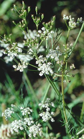 Harilik köömen